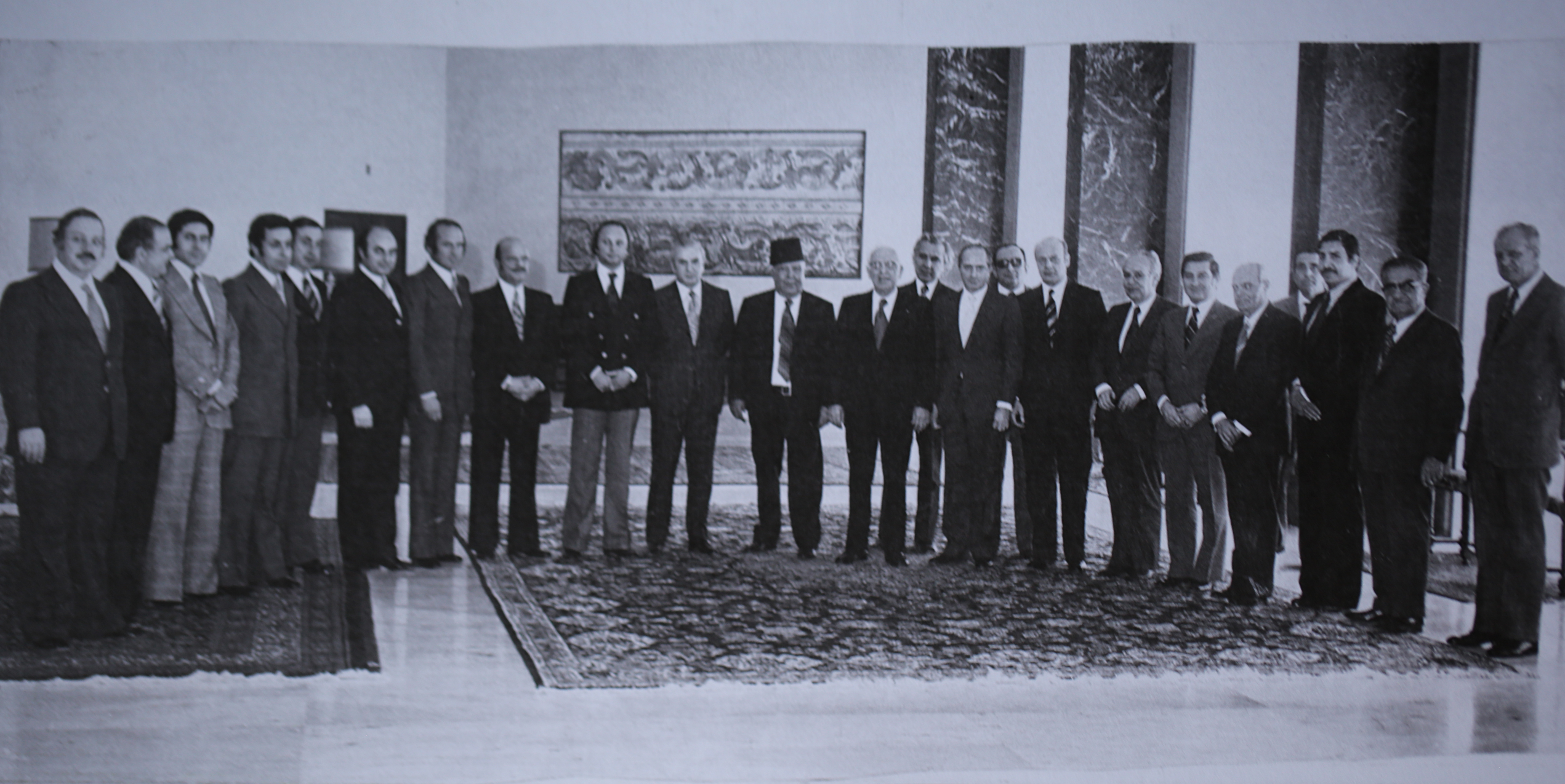 L'Association des Industriels avec le President Suleiman Franjieh